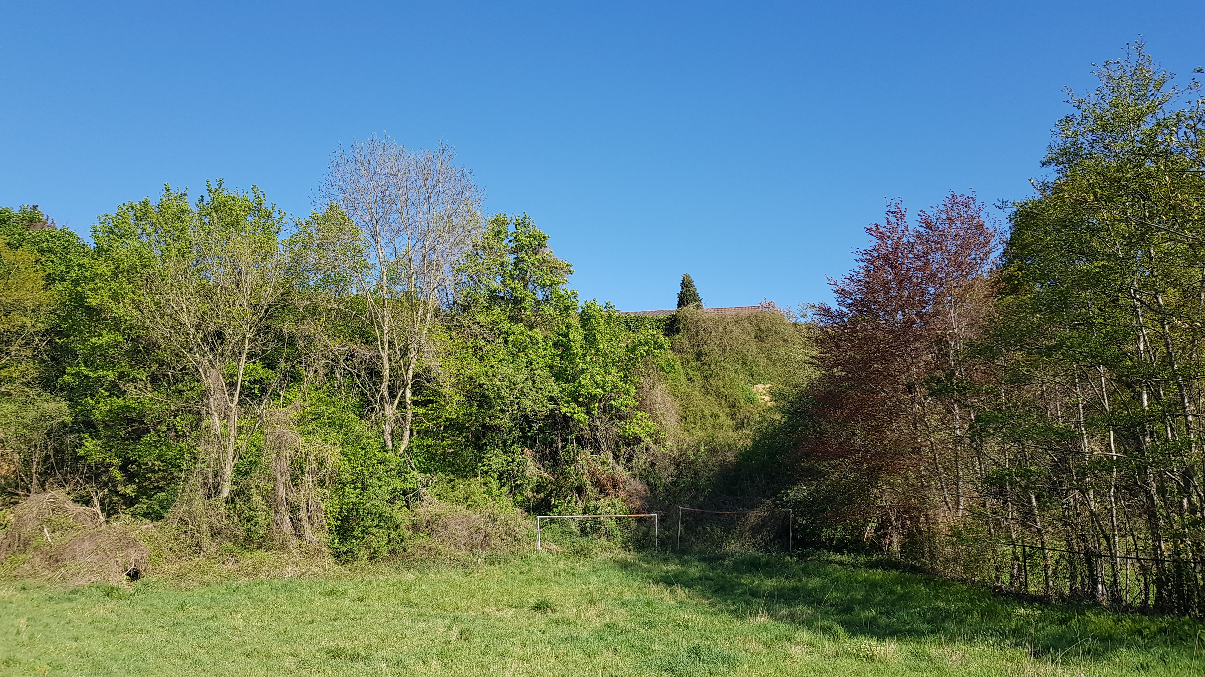 Heekerbeekgroeve, Valkenburg aan de Gulp, Nederland